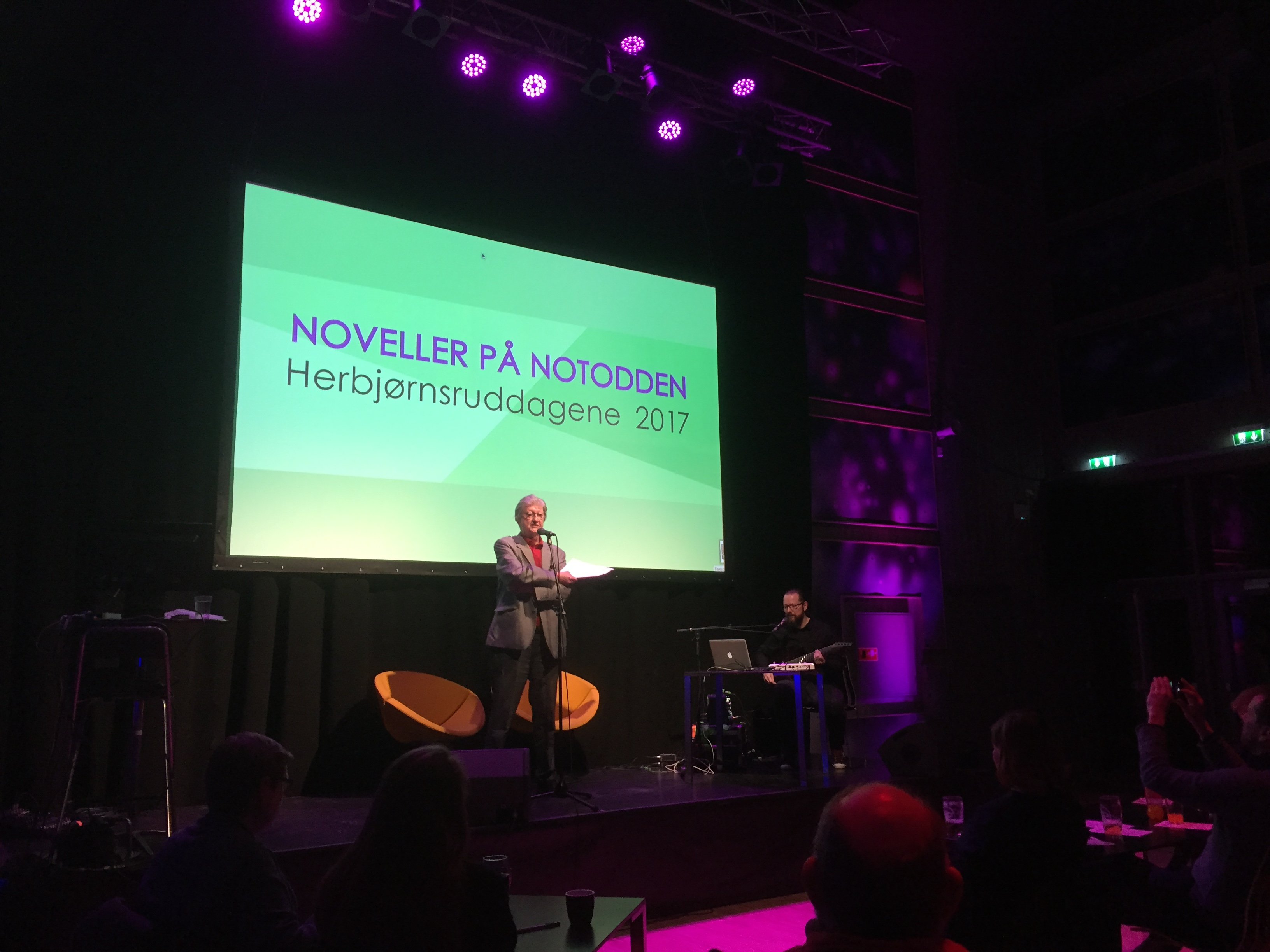 Novellisten Hans Herbjørnsrud leser fra Livescenen i Bok- og blueshuset på Notodden 24. mars 2017